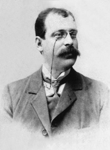 Goffredo di Crollalanza, secondo direttore dell'Annuario della Nobiltà Italiana dal 1892 al 1905